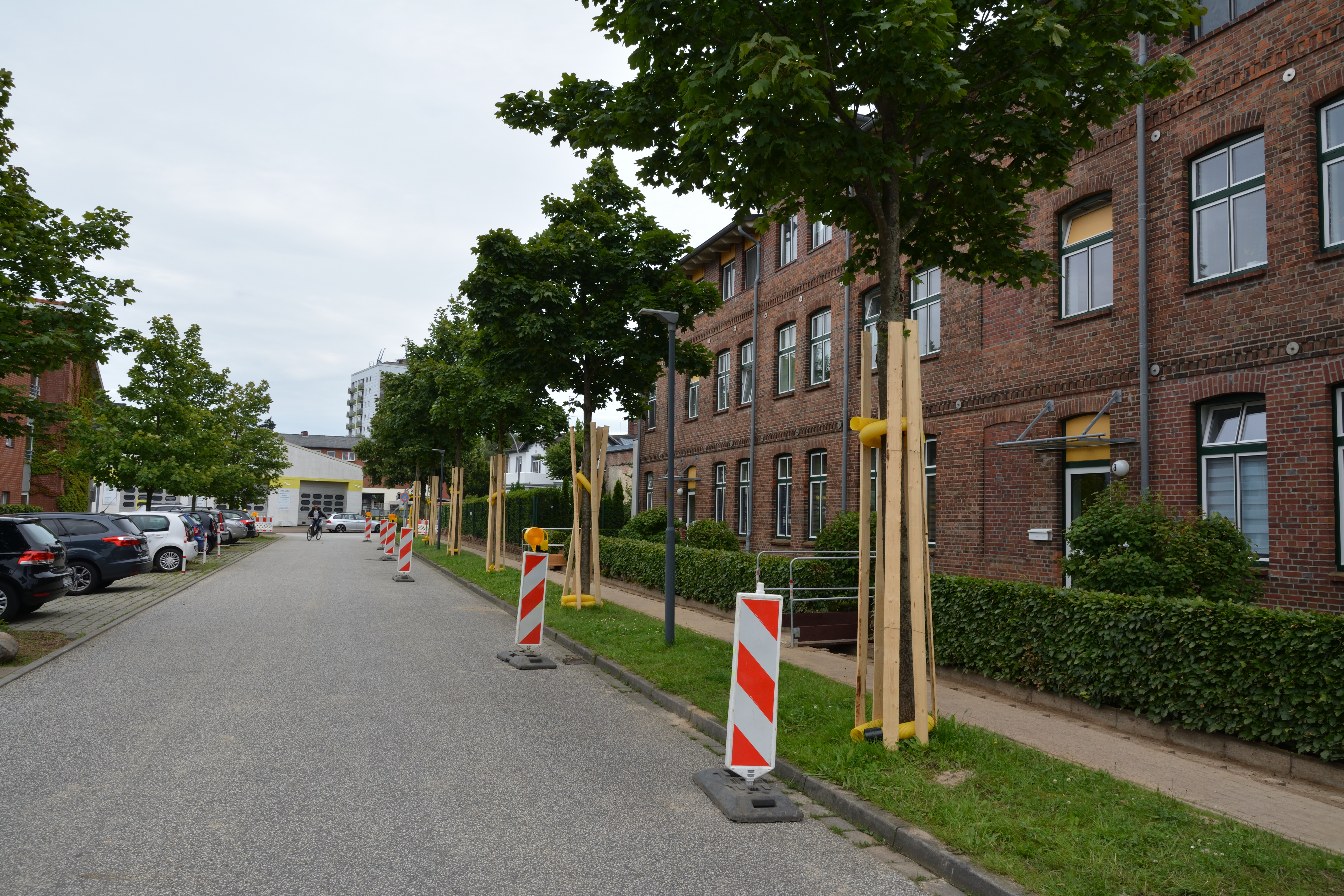 Baumschutz während einer Baumassnahme in Itzehoe